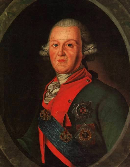 Неизвестный художник второй половины 18 века Портрет Петра Дмитриевича Еропкина П.Д. Еропкин (1724—1805) начал службу в 1736 году, участвовал в Семилетней войне, за что был произведен в генерал-поручики, но вскоре „по слабости здоровья" уволен и назначен сенатором. Во время эпидемии чумы в 1771 году ему было поручено ..охранять" Москву „от чумной заразы". После двенадцати лет отставки, в 1786 году, вновь назначен московским главнокомандующим, но вскоре „болезнями истощенные силы" заставили его покинуть этот пост. Еропкин был гостеприимен и хлебосолен по-старинному, его внешность и манеры отличались старомодной сановитостью; он ездил с трубачом, который трубил когда Еропкин останавливал экипаж. Умер скоропостижно за партией в рокамболь. П.Д. Еропкин изображен с орденами Андрея Первозванного, Владимира I степени, Александра Невского и Анны 1 степени (определение персонажа портрета принадлежит Б.А. Косолапову).